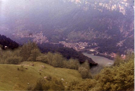 autore: groucho85 fonte: groucho85 descrizione: panorama di Villa di Chiavenna licenza d'uso: pubblico dominio note: foto scattata da me, groucho85, per wikipedia